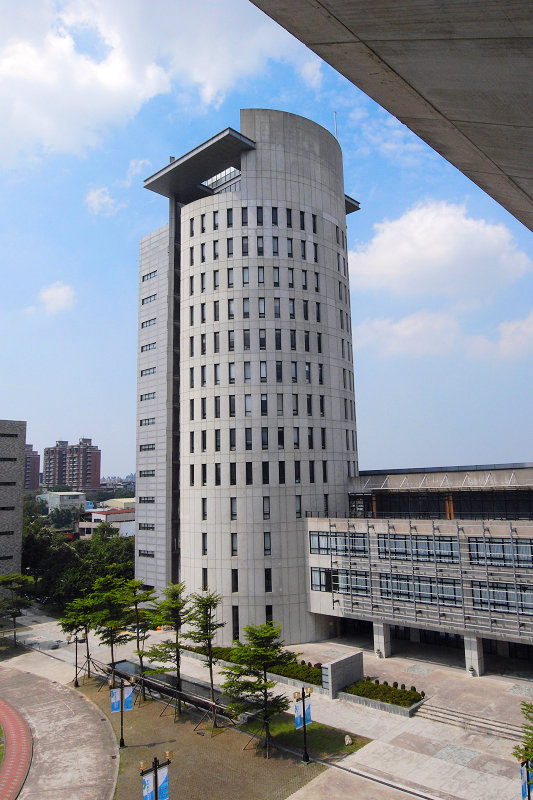 粵語: 元智六館